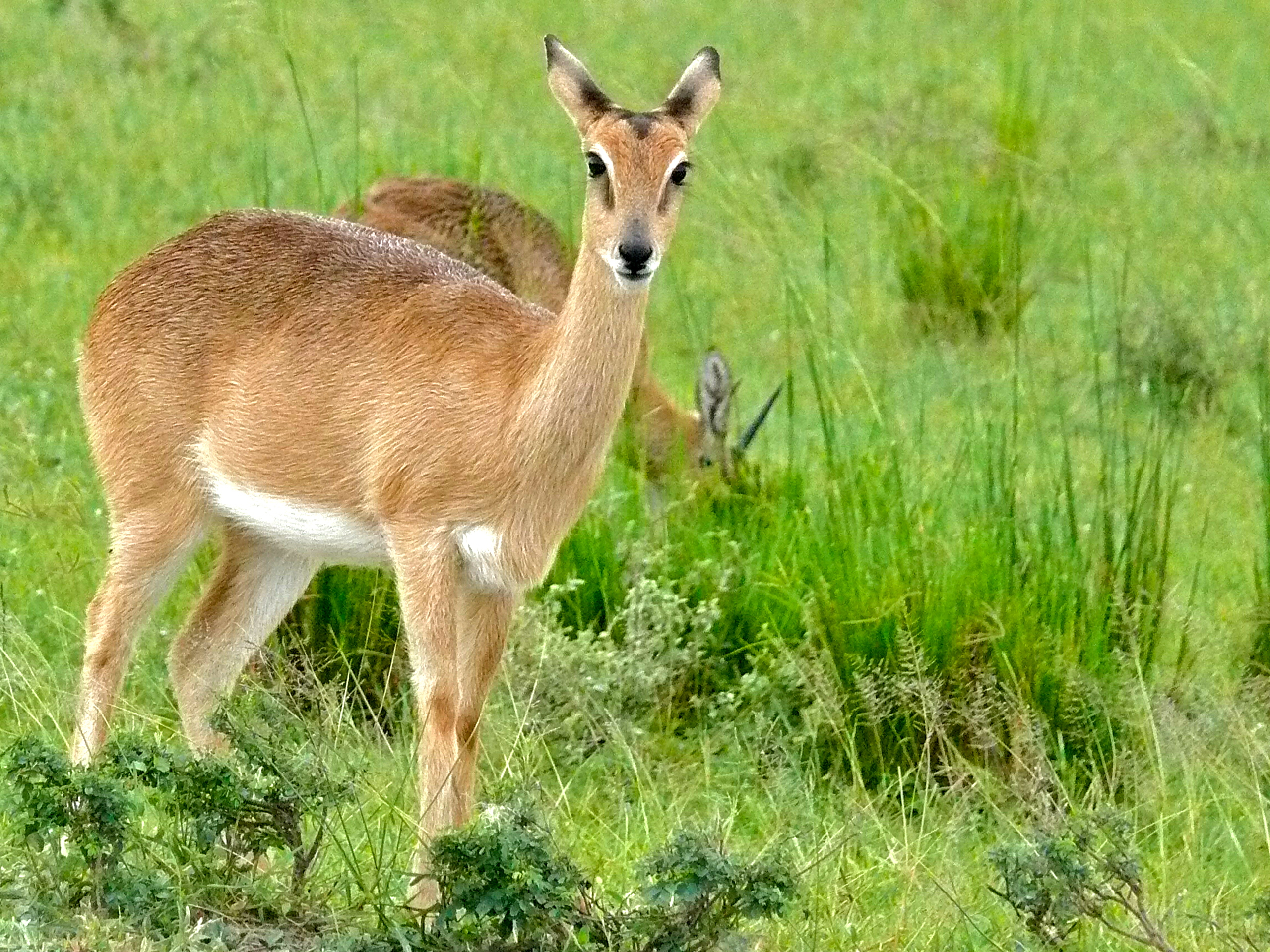 Murchison Falls NP, UGANDA